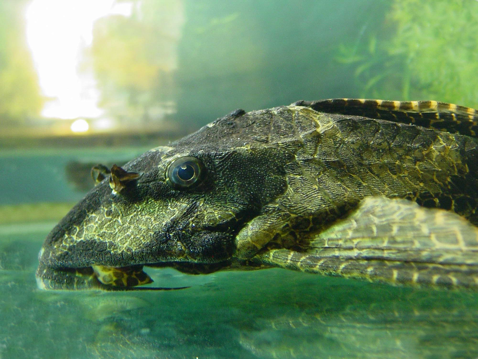 self made. lg: Peixe nun acuario (auga doce) es: Pez en una pecera (agua dulce)